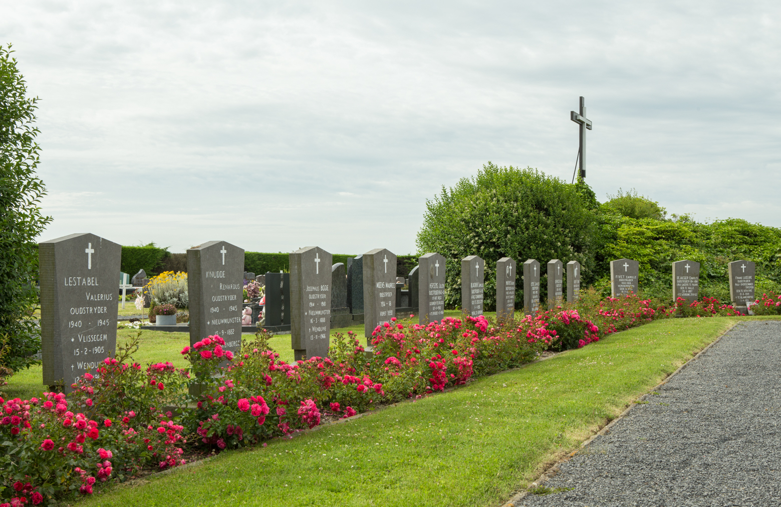 Wenduine Communal Cemetery